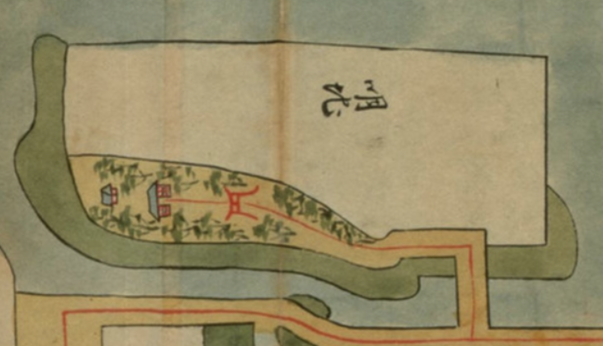 館林尾曳稲荷神社 綱吉時代の稲荷郭 〔日本古城絵図〕 東山道之部（4）. 165 館林御城図より抜粋